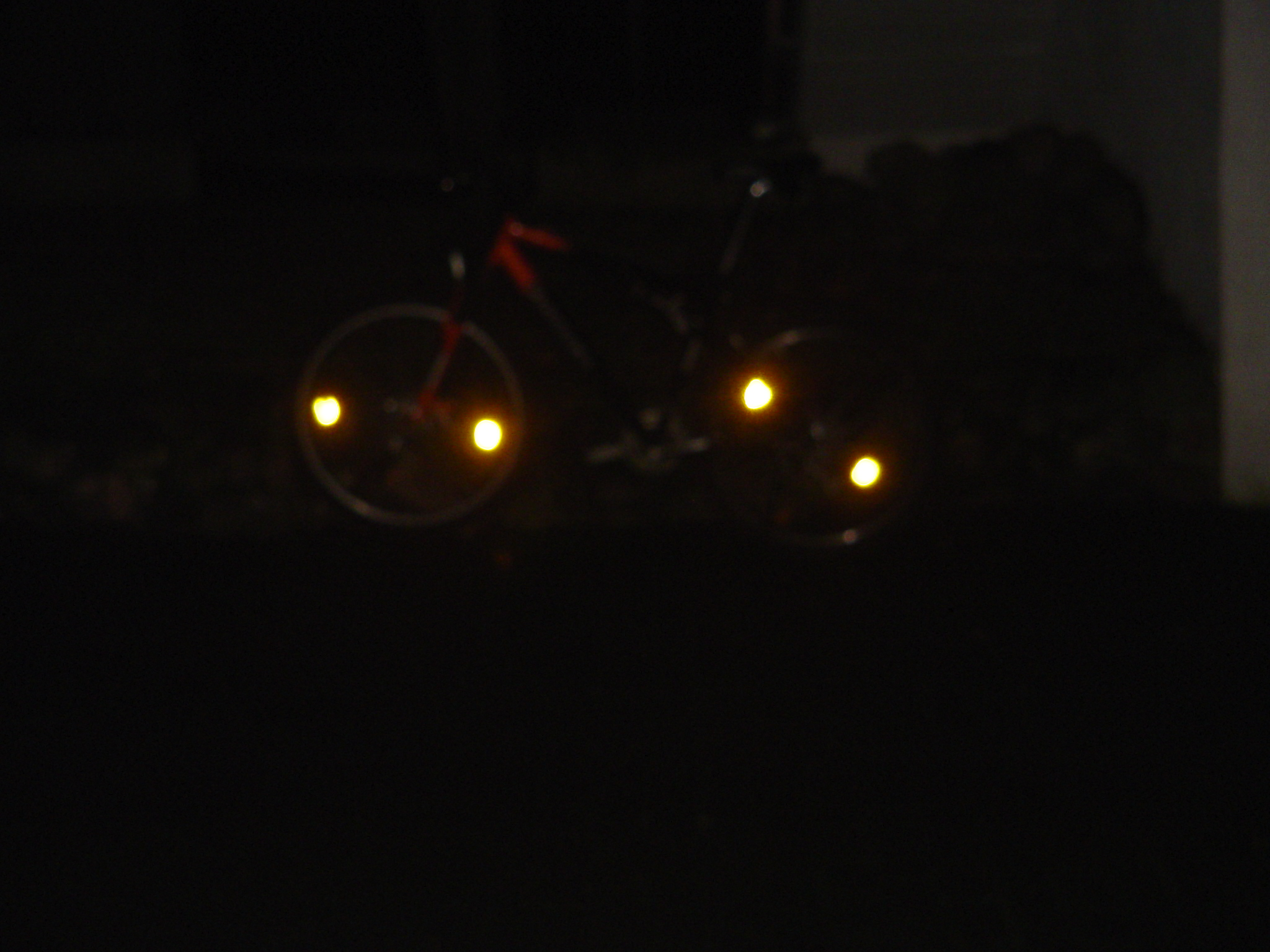 Fahrradreflektoren